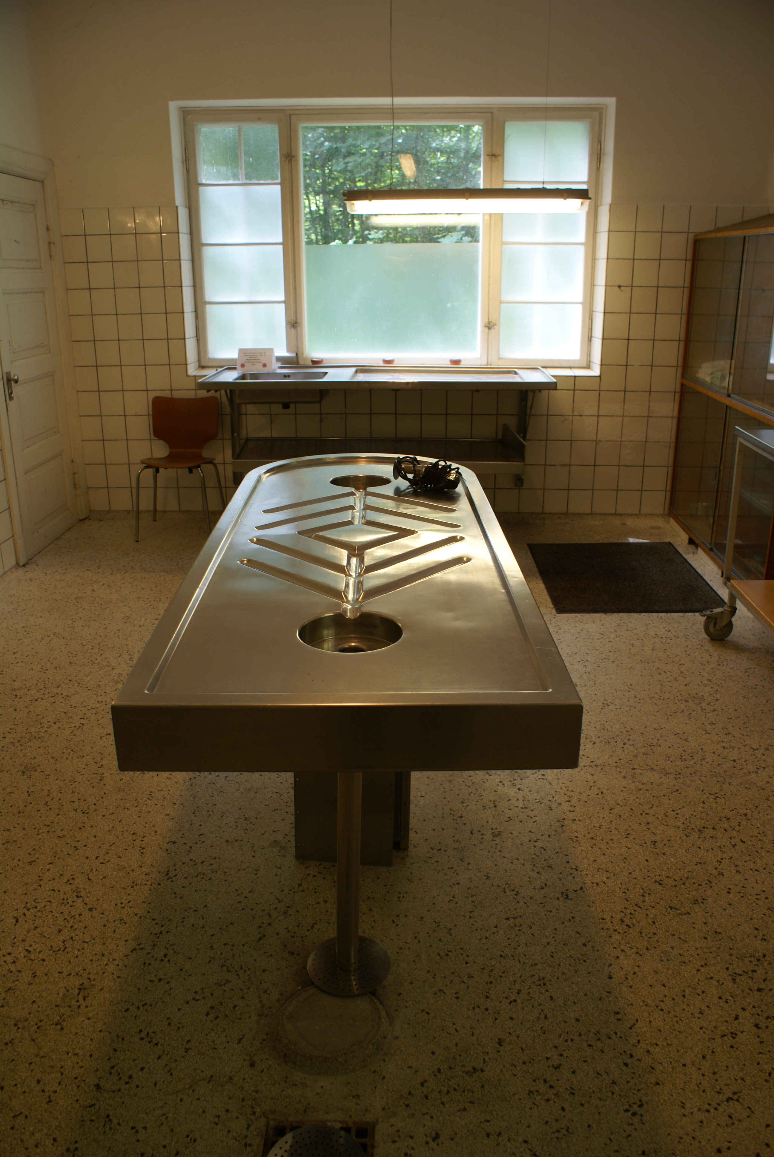 Dissektionsbordet i kapellet på Psykiatrihospitalet i Nykøbing Sj.